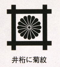 井桁に菊紋(井桁に十六菊)、井筒に菊紋(井筒に十六菊)、籬架菊紋